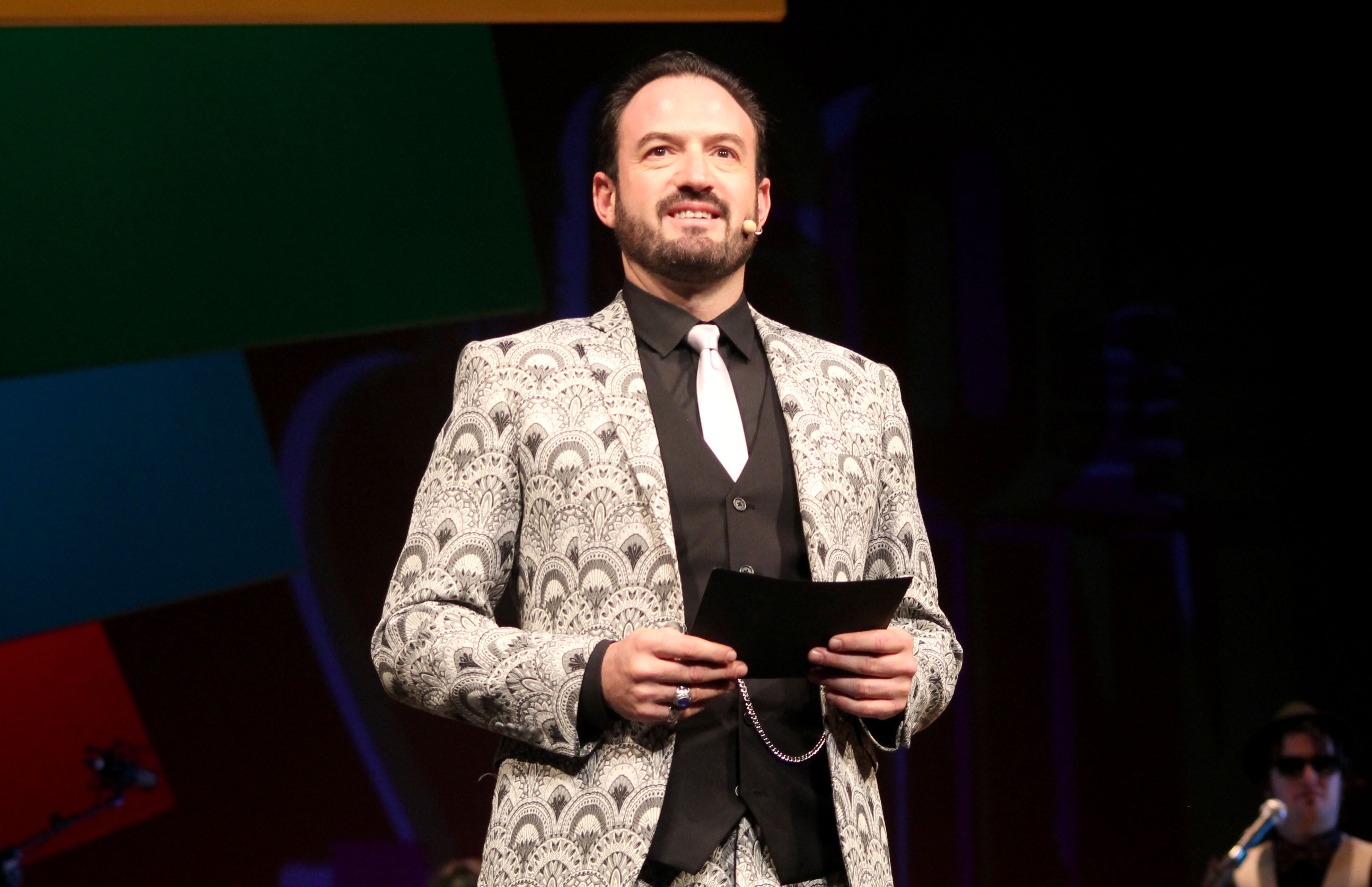 Seminci 2015